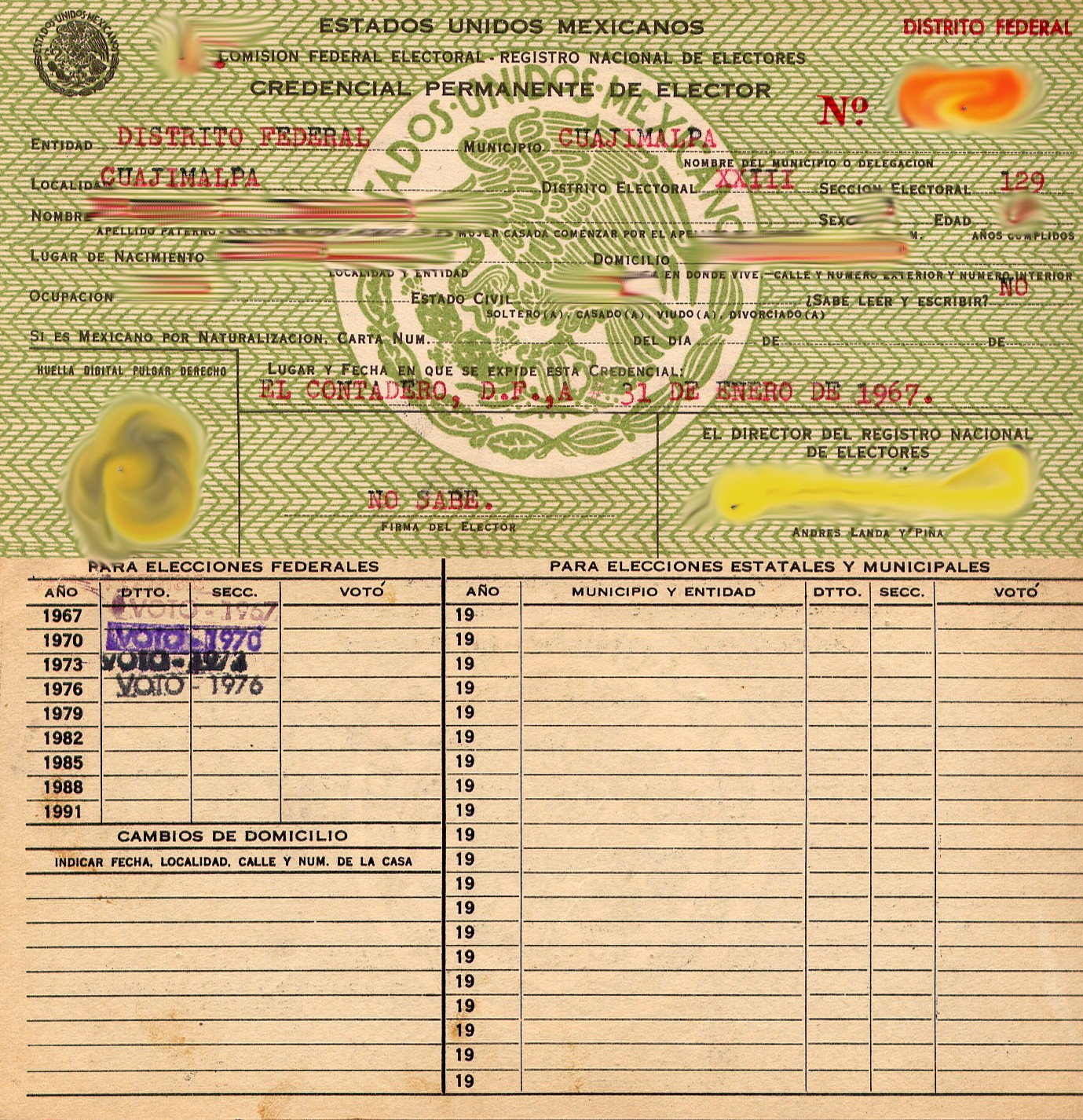 Esceneo de una credencial para votar usada en México, entre 1967 a 1982, se muestra el anverso y el reverso de la misma, los datos personales fueron eliminados. Emitida en el Contadero, Distrito Federal.1967.